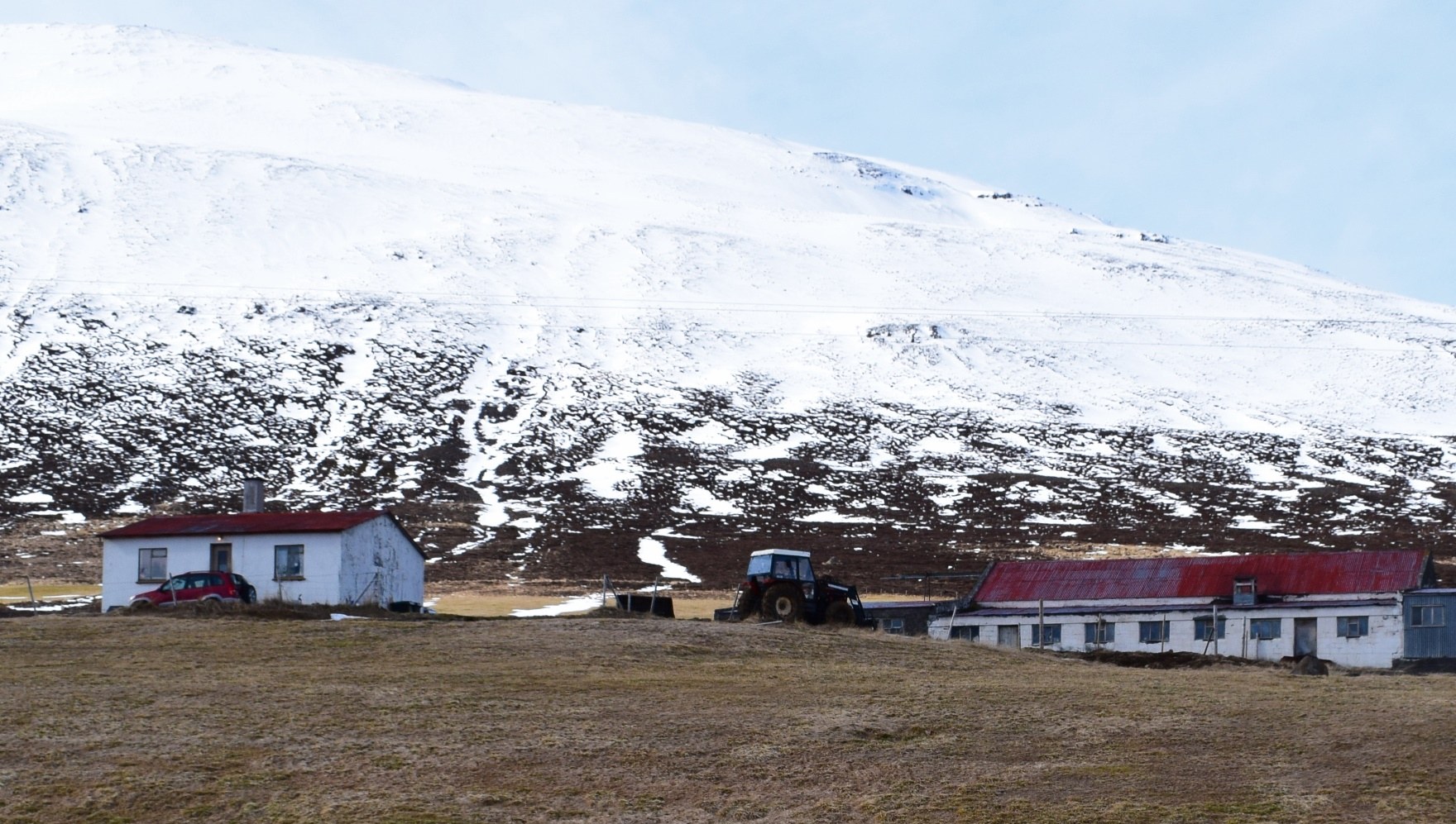 Helgafell í Svarfaðardal